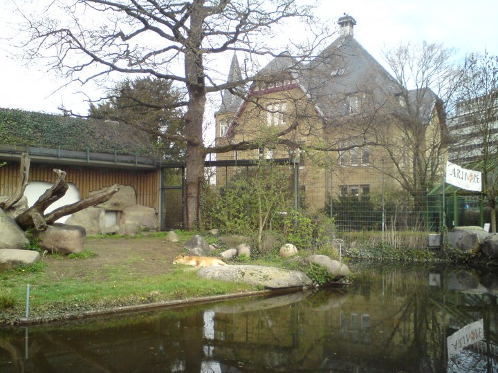 Karlsruhe Zoo. Lejonanläggning och kontor. Foto: Dan Koehl